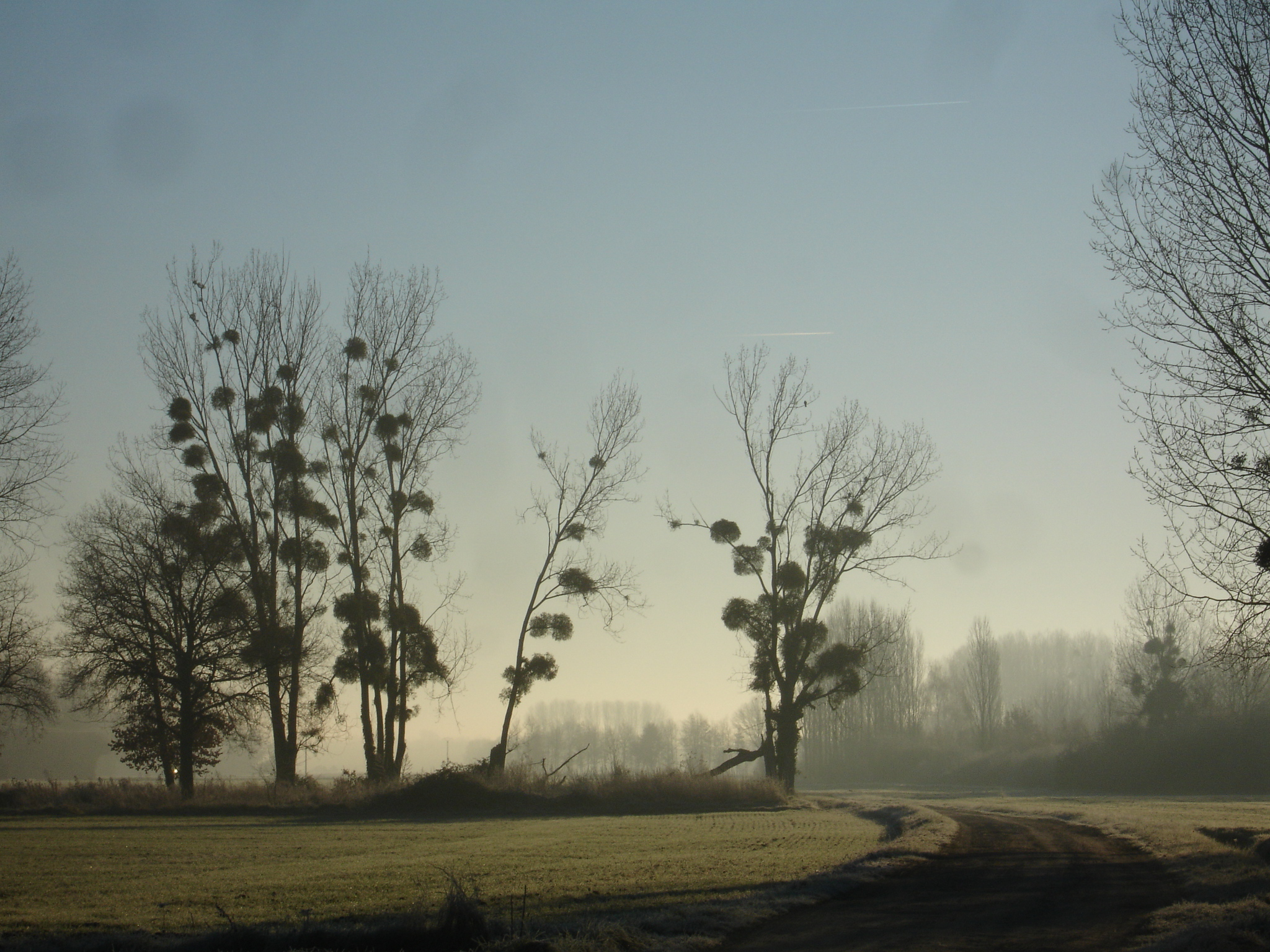 chemin de la varenne du Cher, proche de la limite de commune avec La Croix en Touraine